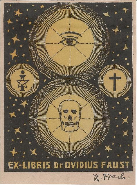 Ex-Libris,Ein Werk des Malers und Graphikers Karl Frech